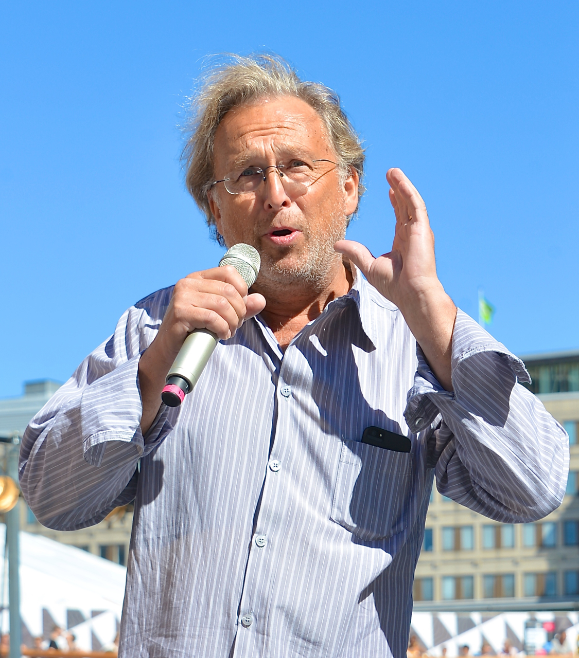 Philip Zandén på Sergels torg under Stockholms Kulturfestival 2013. Smakprover ges ur den kommande säsongens föreställningar på Stockholms Stadsteater.